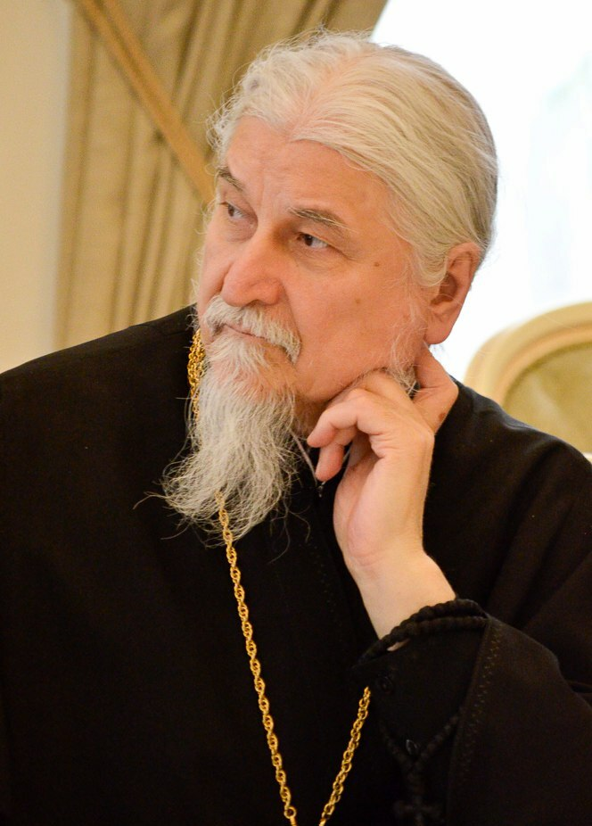 Научно-практическая конференция «Всеправославный собор мнения и ожидания»